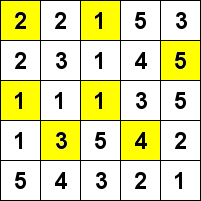 Egen teckning